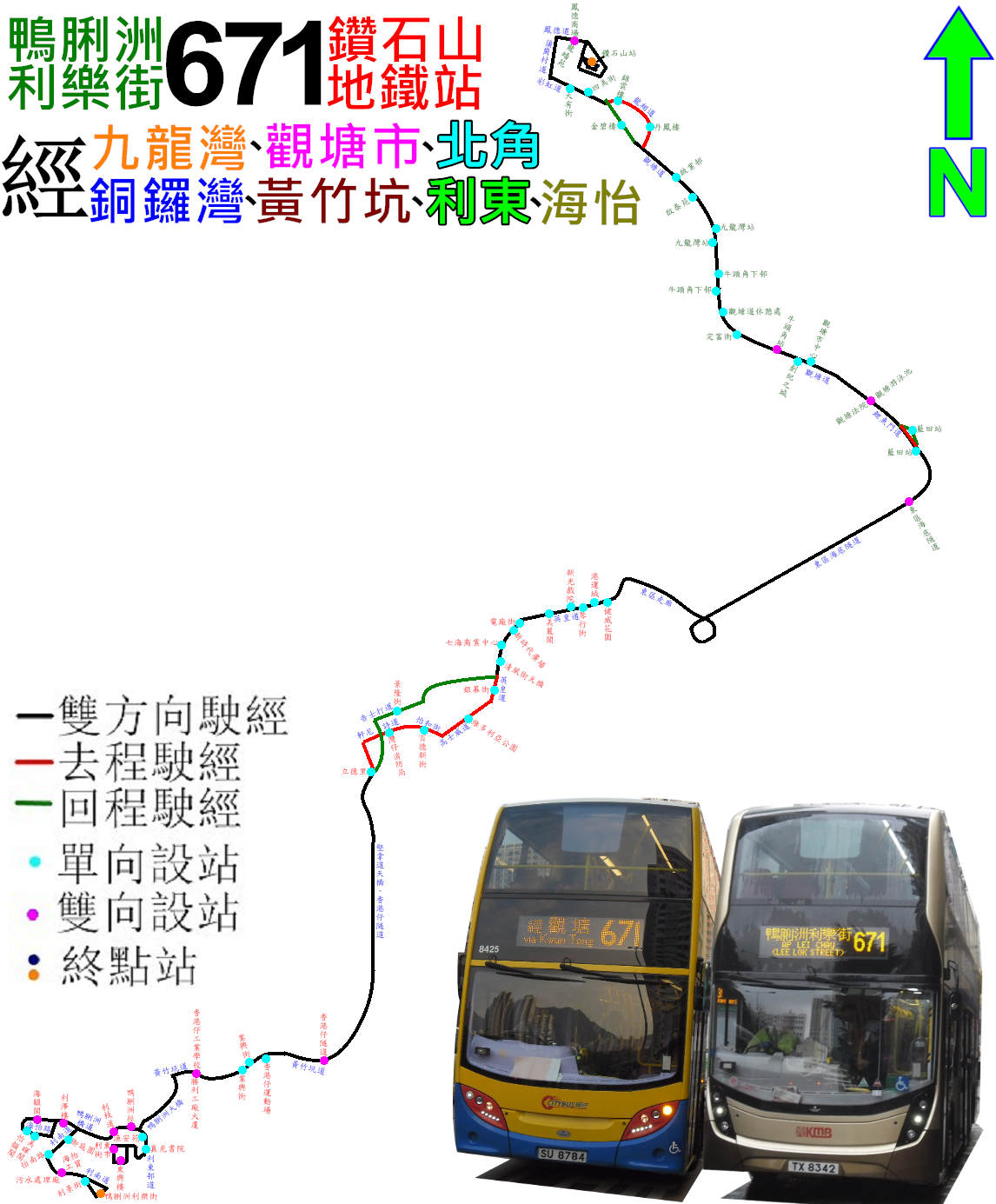 中文（香港）: 過海隧巴671線的走線圖